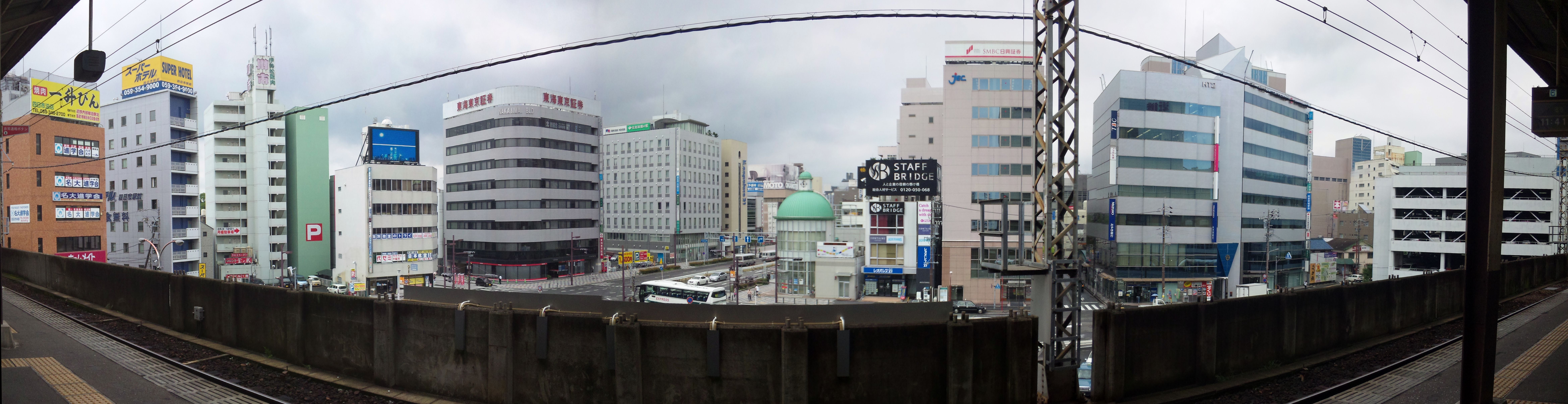 近鉄四日市駅6番線ホームより西口